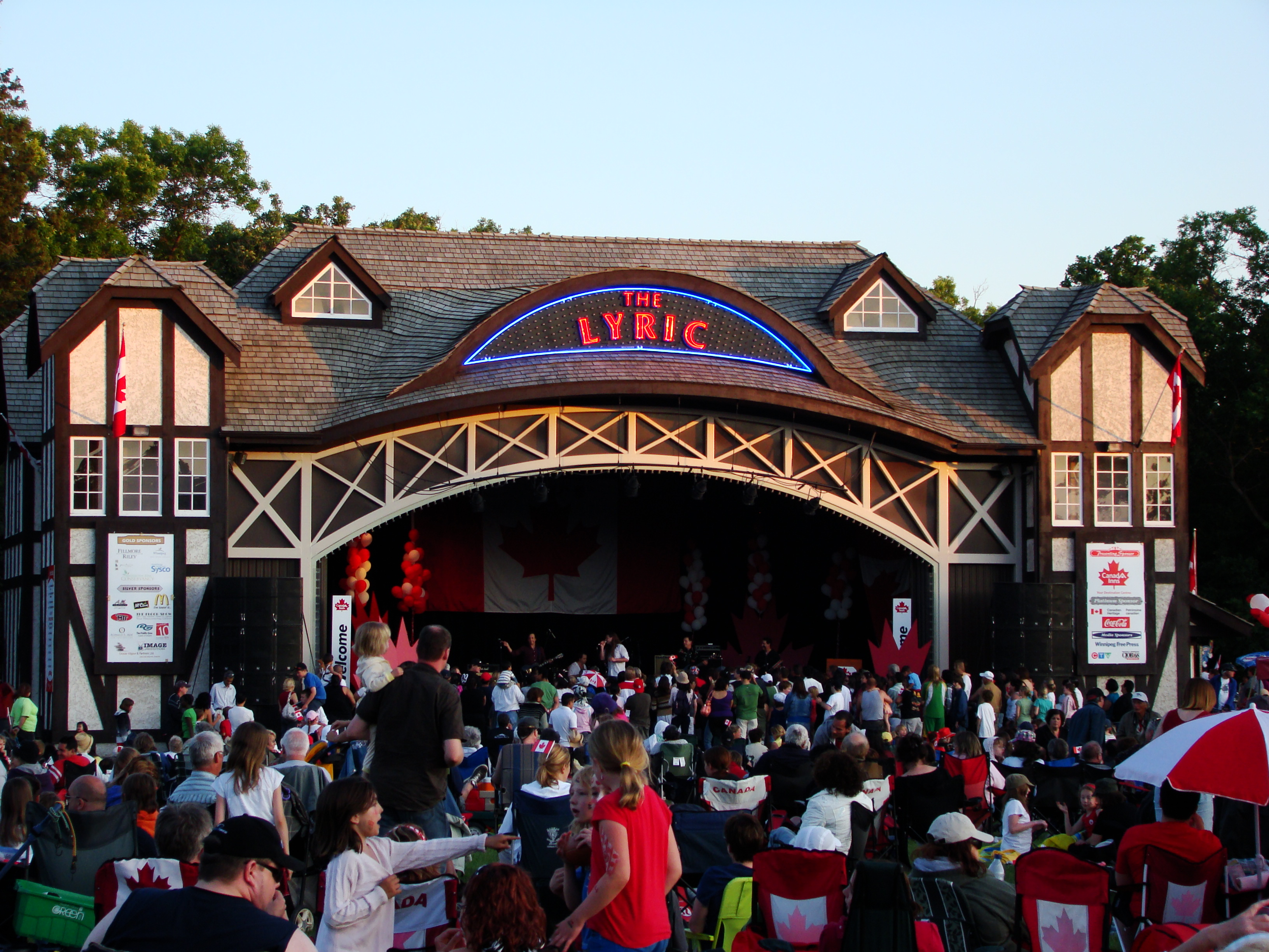 Canada Day 2009 at Assiniboine Park Winnipeg Manitoba Canada